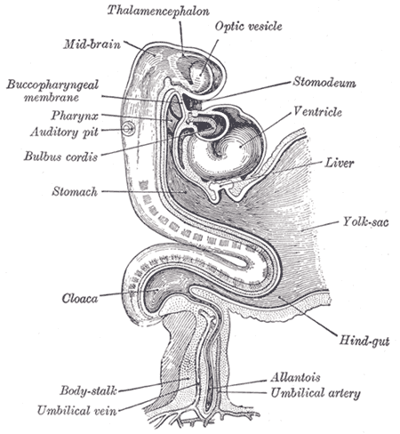 Sviluppo embrionale del tubo gastro-enterico